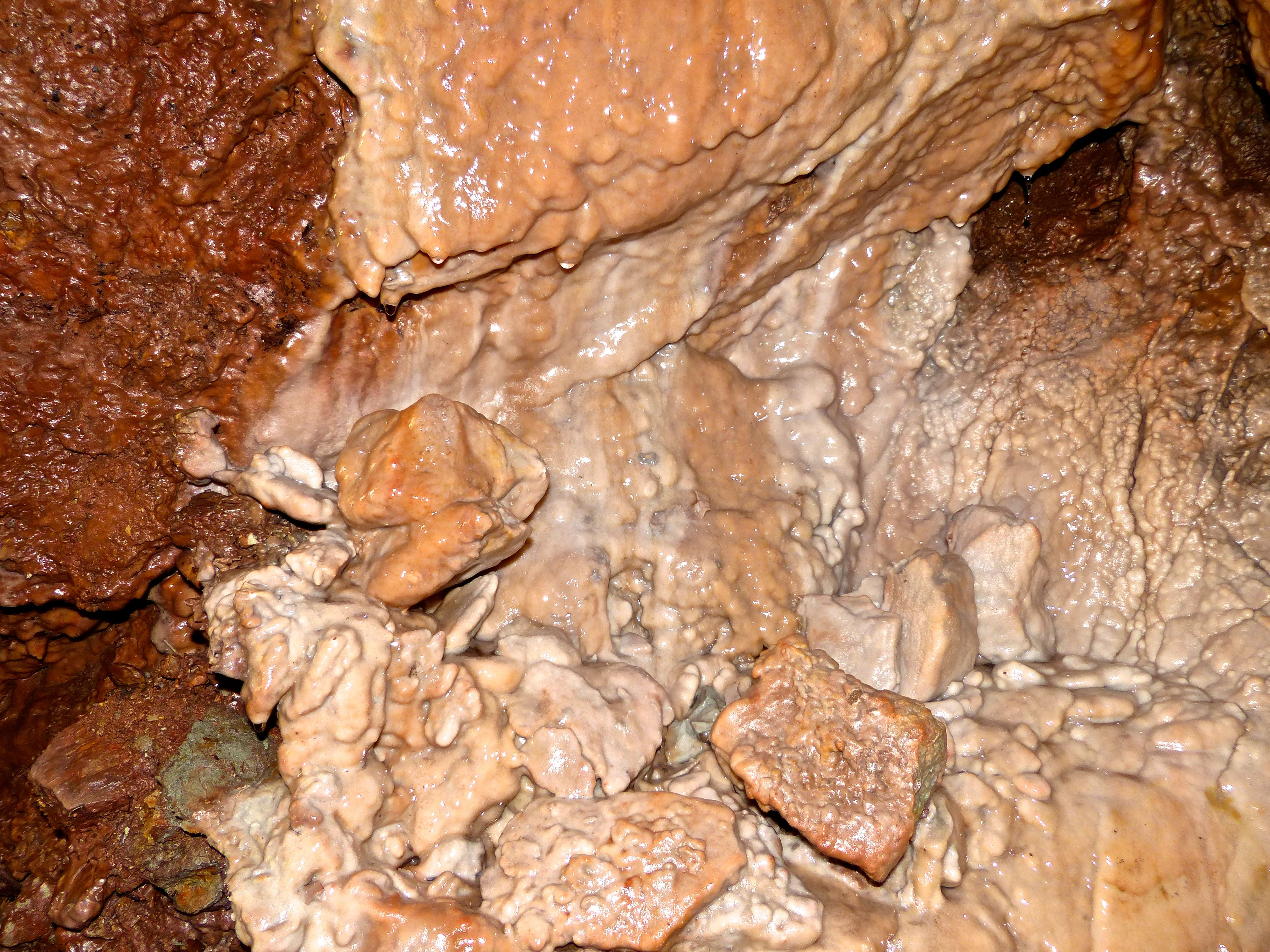 Philippstollen des Briloner Eisenberges: Sinterüberzug